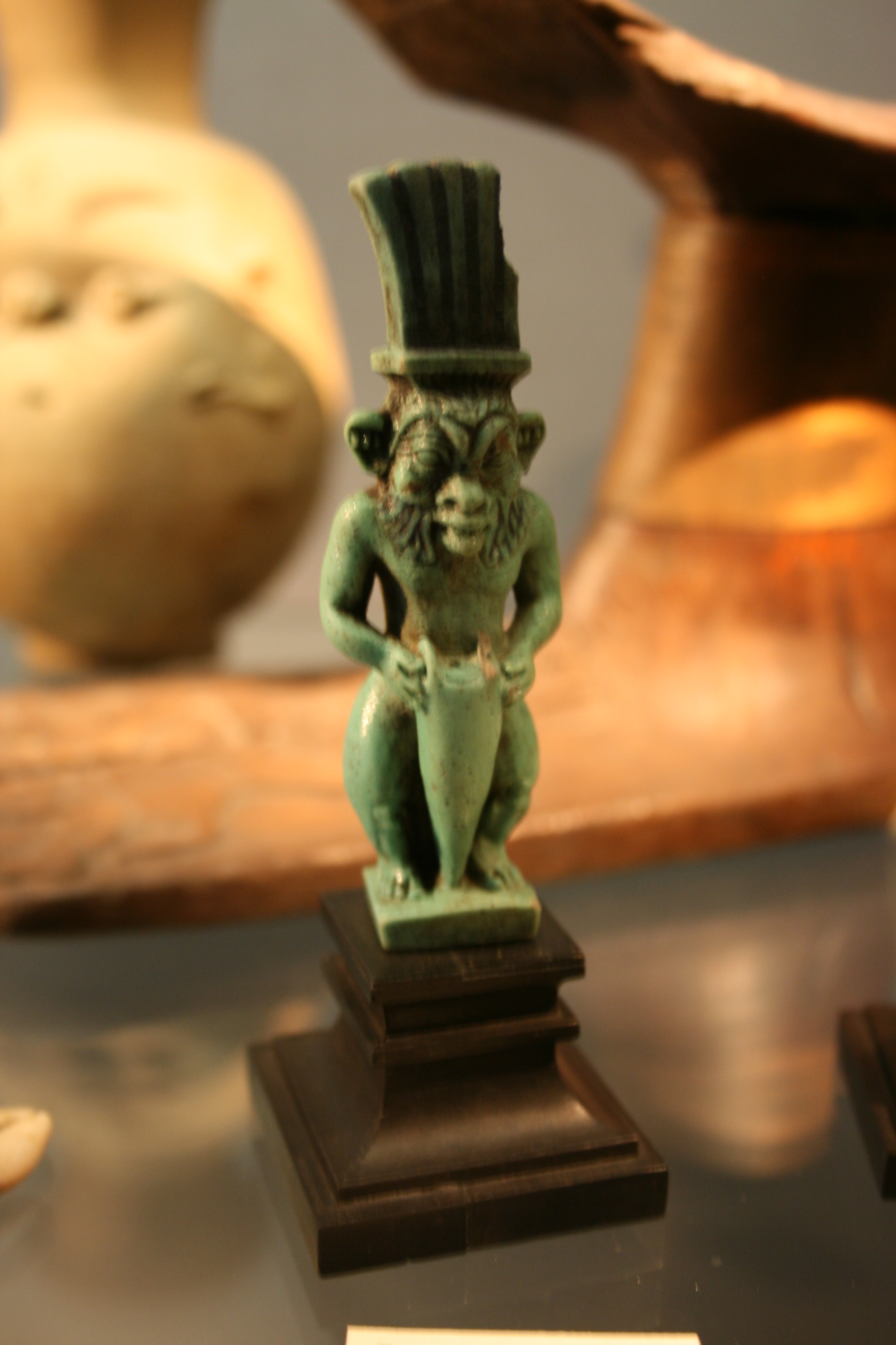 Bes-amulett